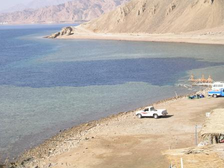 Blue Hole - taken by דפי דפי שומשטיין on 2004-09-03